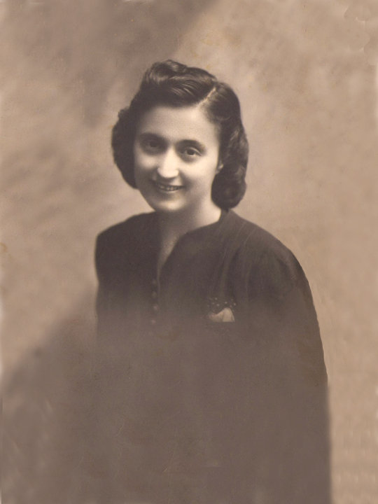 Shadije Beli ne vitin 1940